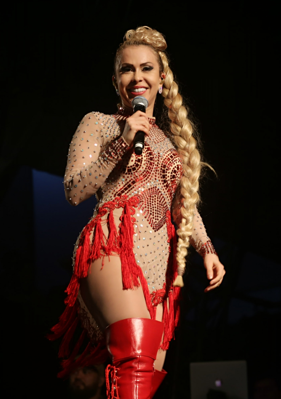 Joelma se apresentando em sua Avante Tour na cidade de Aracaju, Sergipe, em junho de 2018.